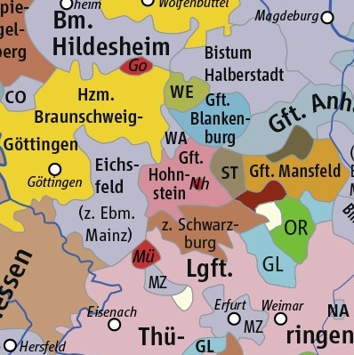 HRR 1400, Ausschnitt Grafschaft Hohnstein